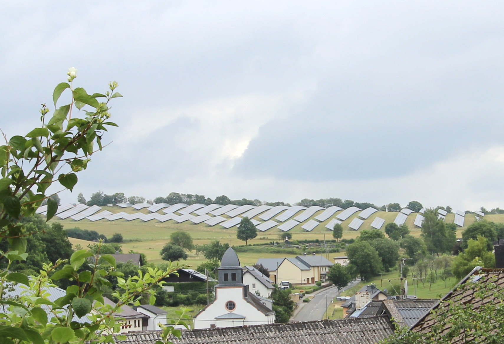 54597 Plütscheid, Solarpark nord-ostlich vom Ort; zwischen Plütscheid und Feuerscheid. Aufnahme von 2017.